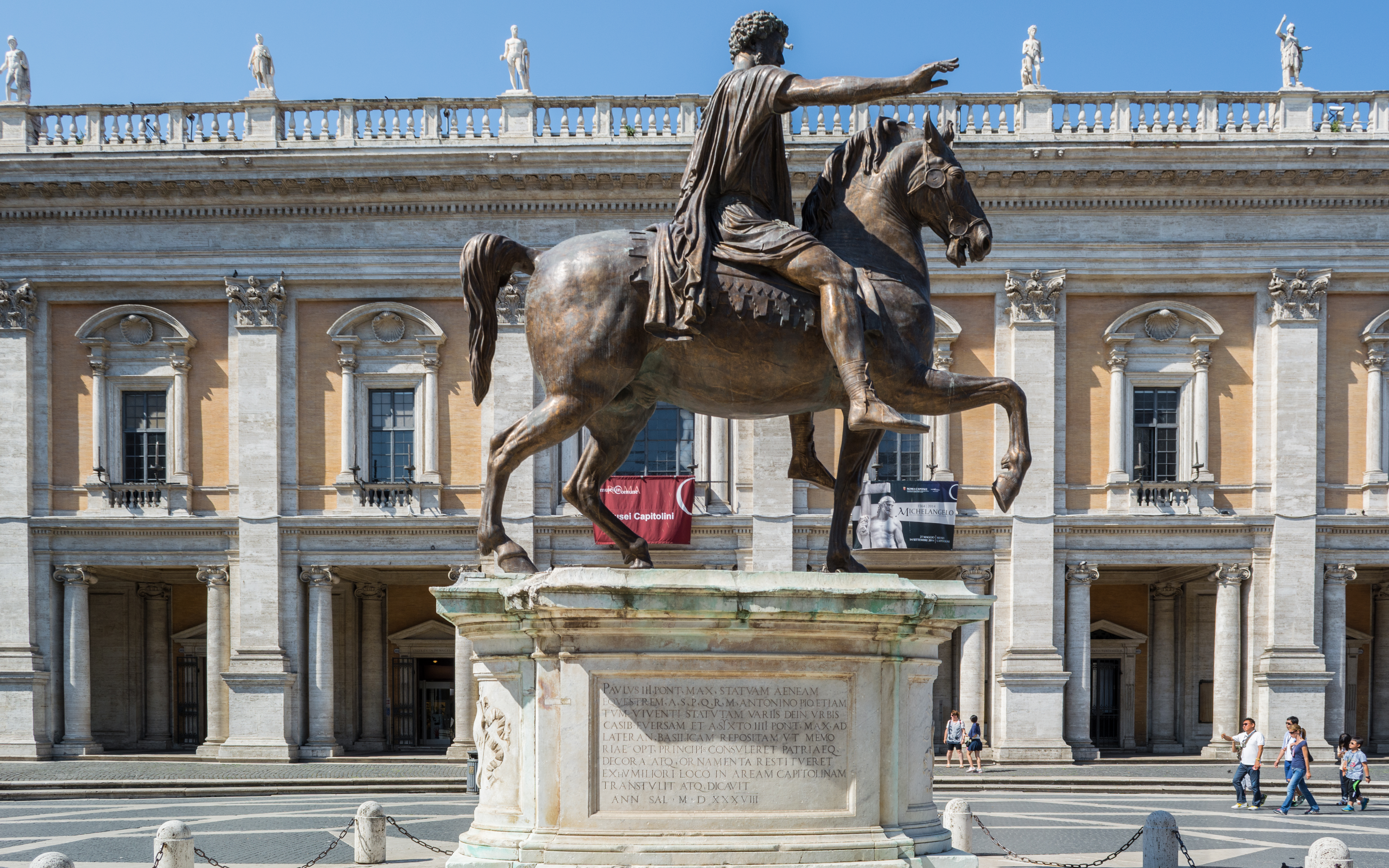 Piazza del Campidoglio, Rome